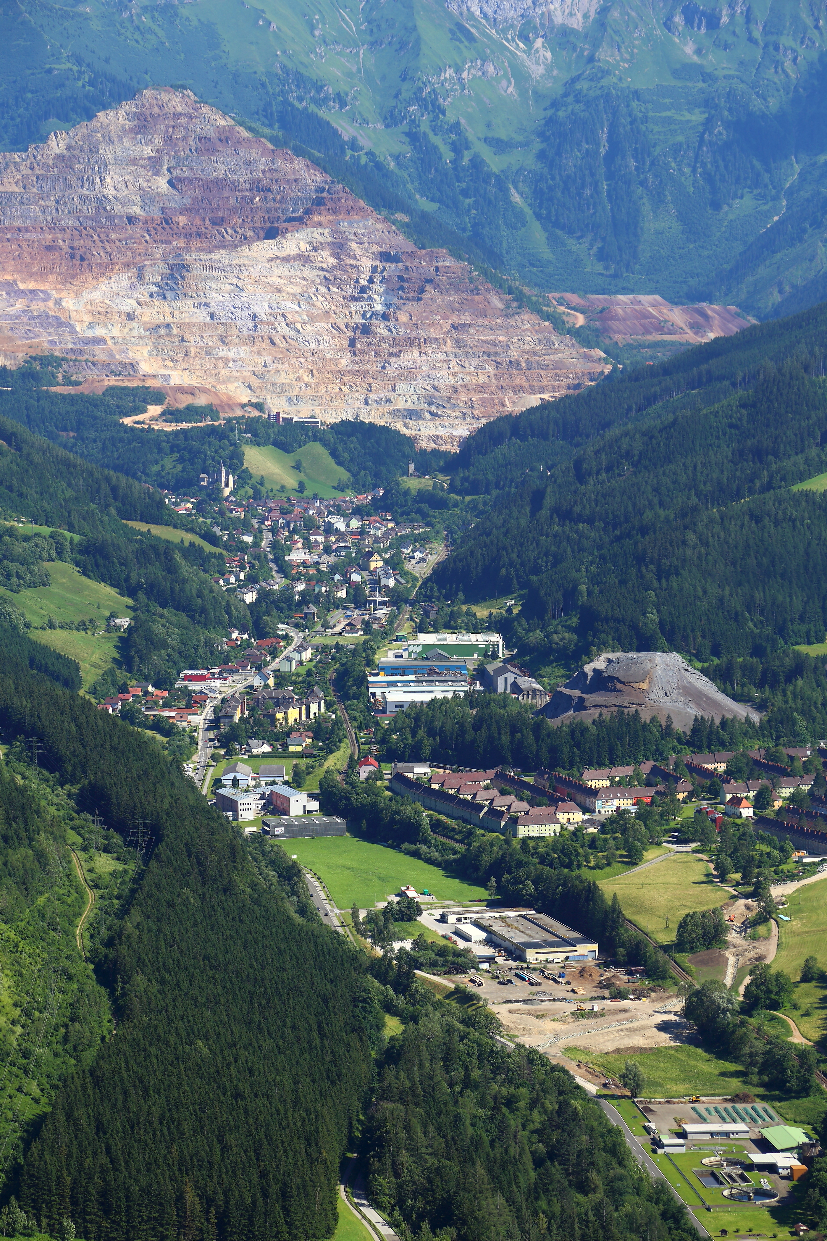 Nordwestansicht der österreichischen Stadt Eisenerz im steirischen Bezirk Leoben mit dem Erzberg im Hintergrund.